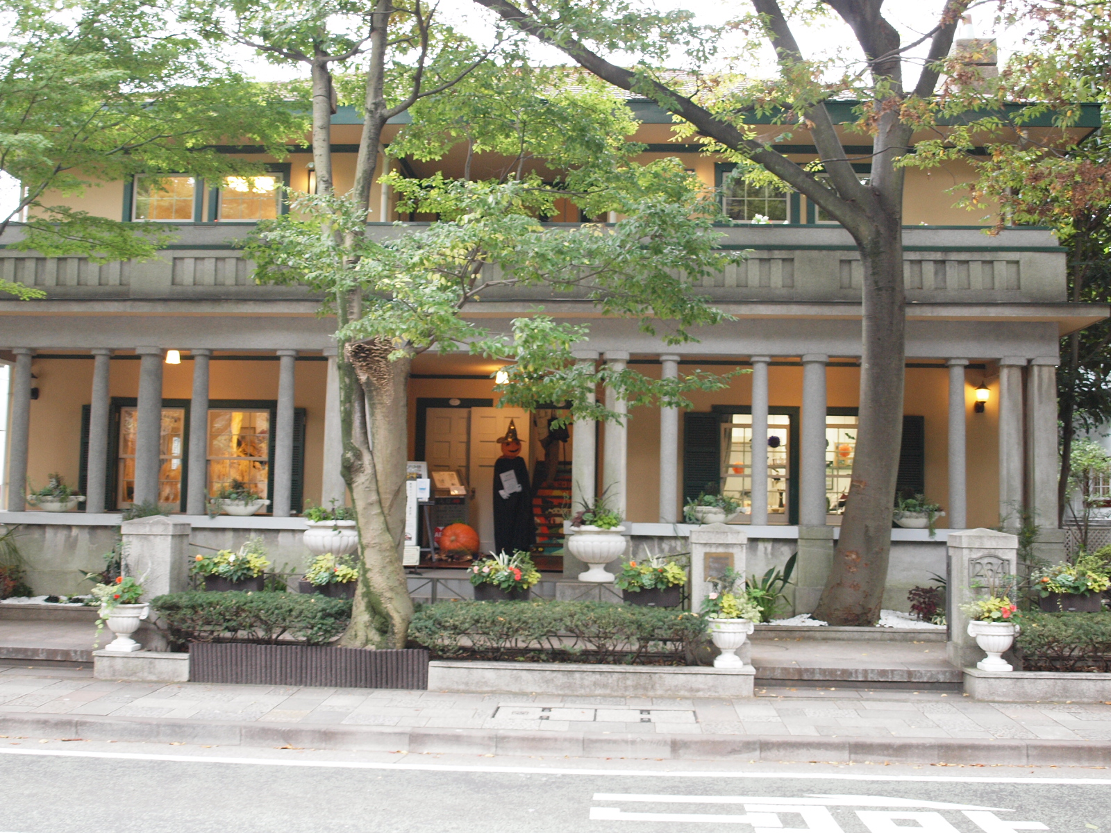 山手234番館（神奈川県横浜市中区山手町234-1） （山手234番館）